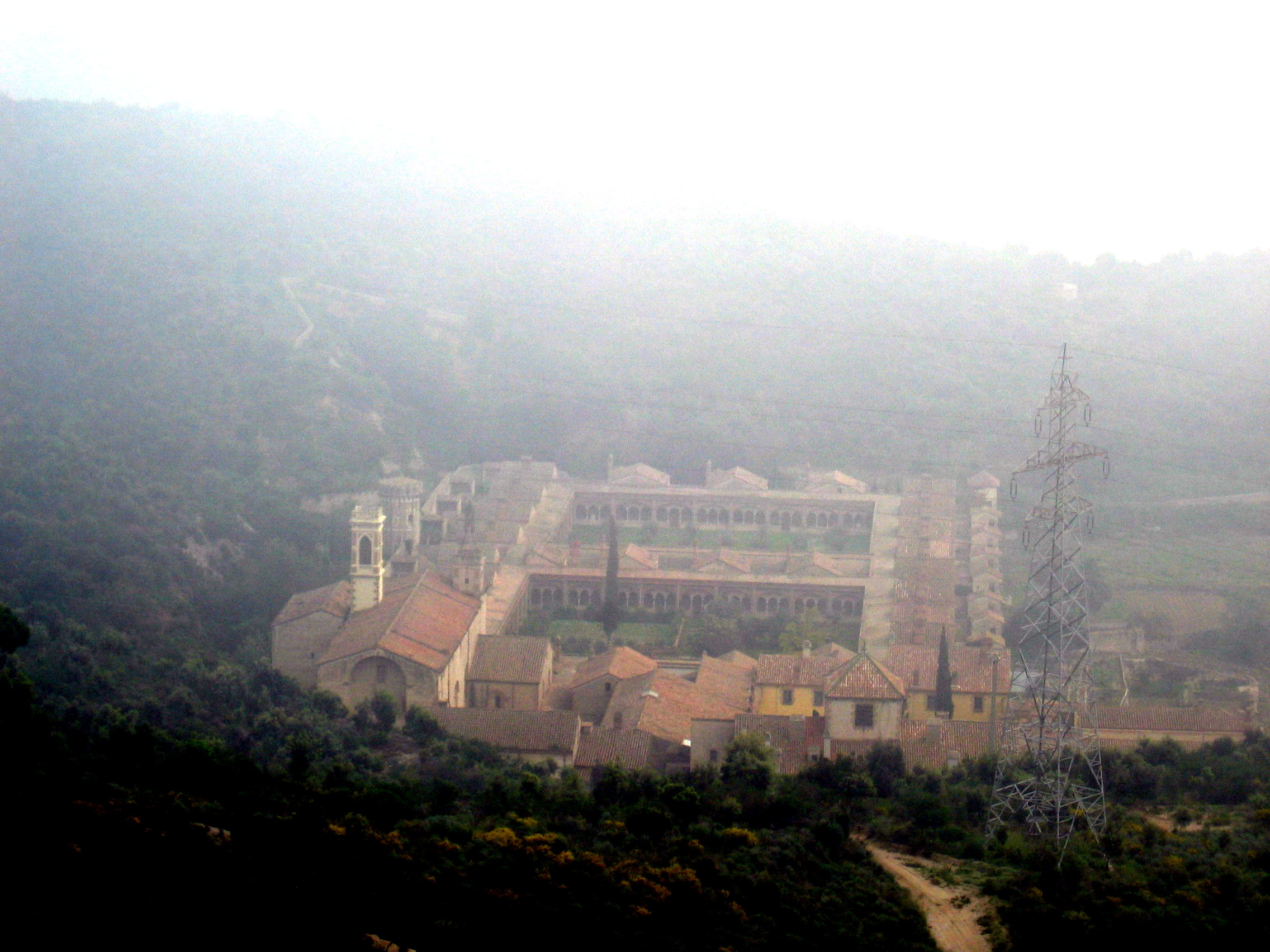 Cartoixa de Montalegre (Tiana) en un dia de boira